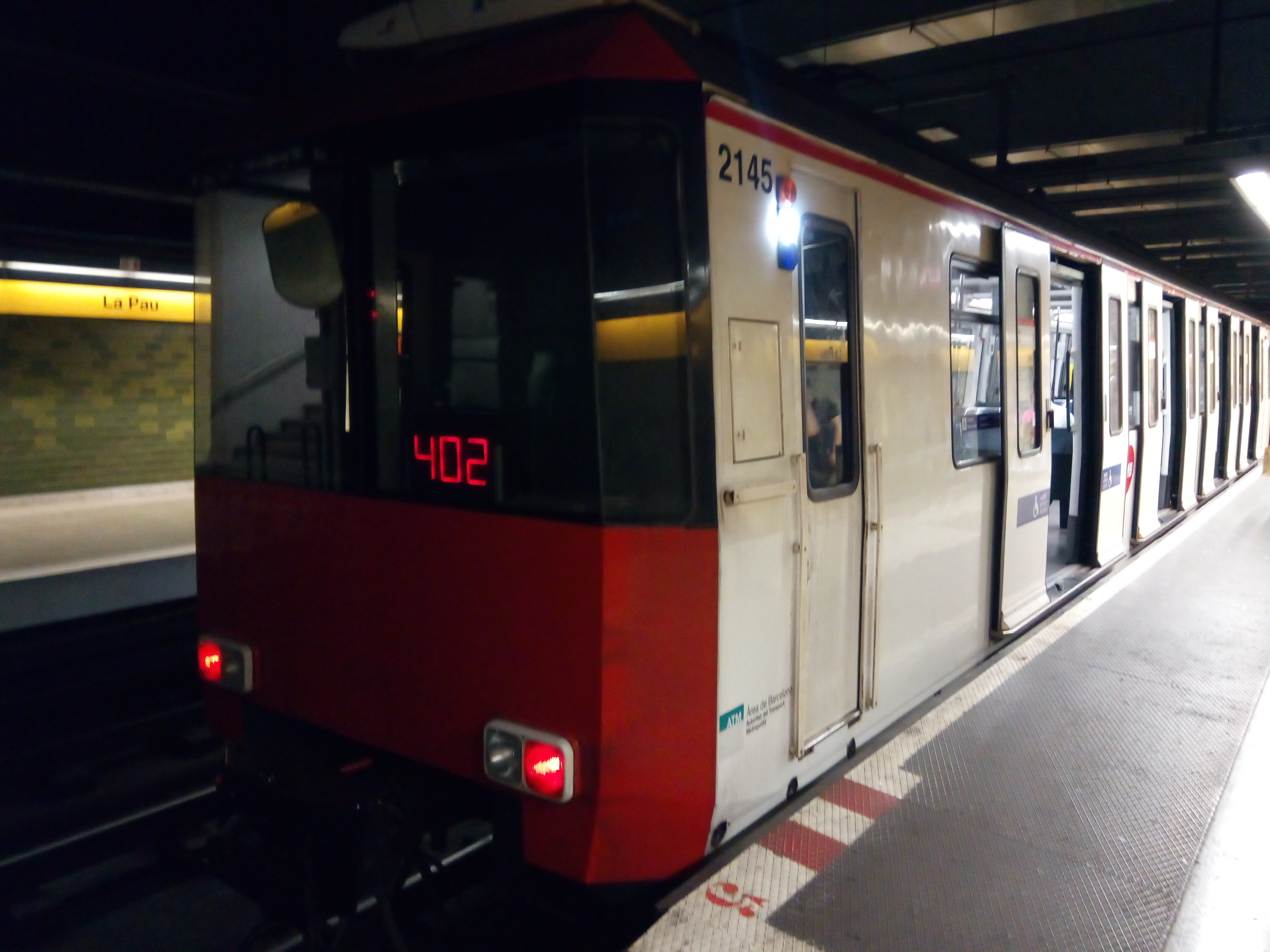 Una unidad de la serie 2100 fabricado por caf del Metro de Barcelona en la estación cabezera de la Pau